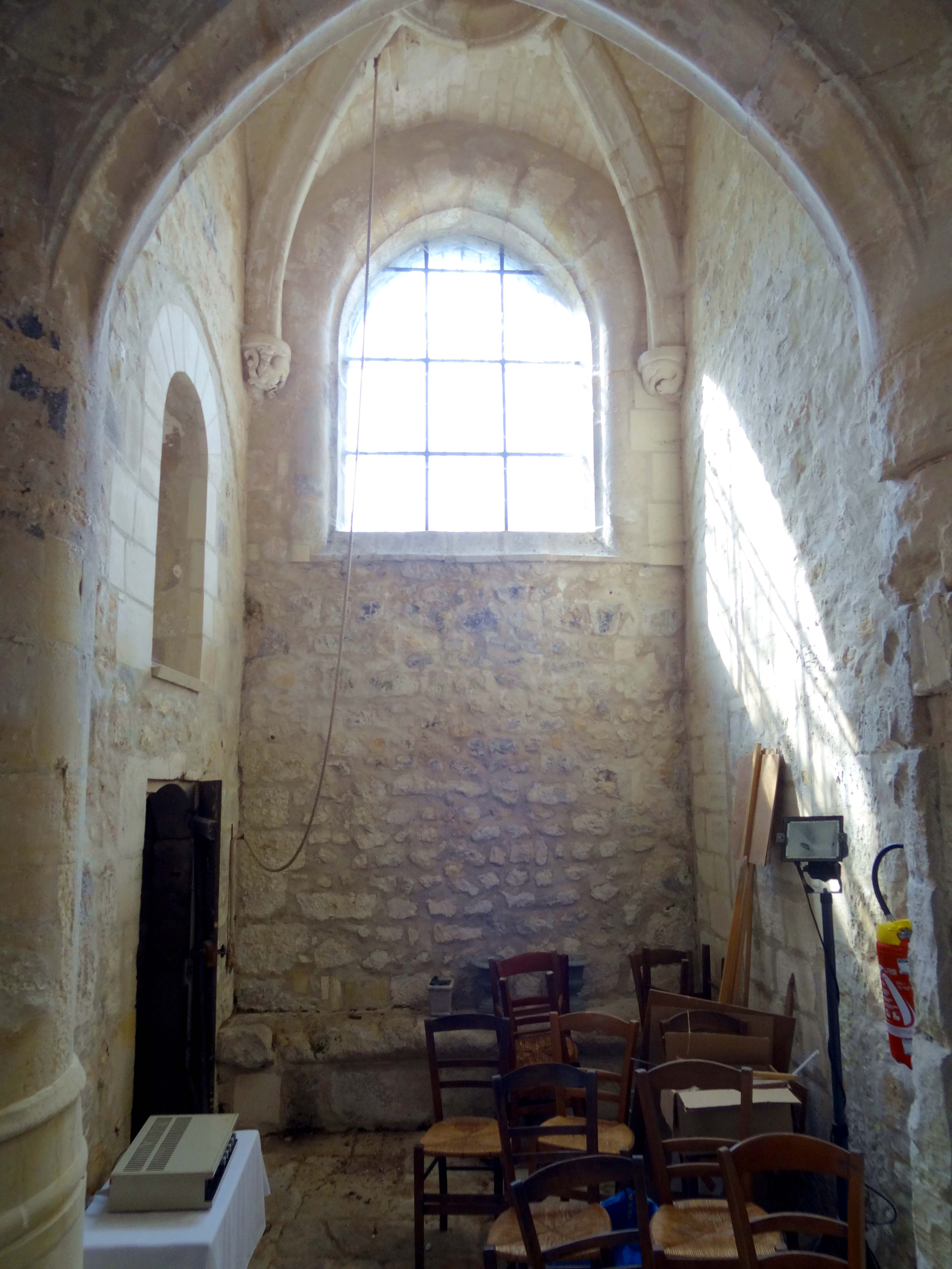 Intérieur de l'église - voir titre.